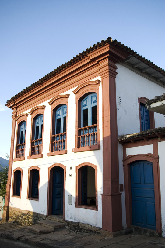 Endereço: Rua Doutor Israel Pinheiro, 176 – Centro – Caeté – MG. Tel: (31) 3651-2388 Horários: De terça a domingo, das 12h às 17h Foto: Divulgação IBRAM migre.me/cJCxT